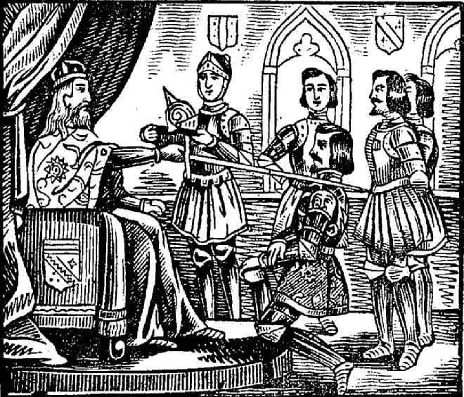 Charlemagne adoube les fils Aymon. Gravure extraite de Les quatre fils d'Aymon, histoire héroïque, M. Ardant (Limoges), 1849 (Gallica : ark:/12148/bpt6k5734522, Bibliothèque nationale de France, département Littérature et art)